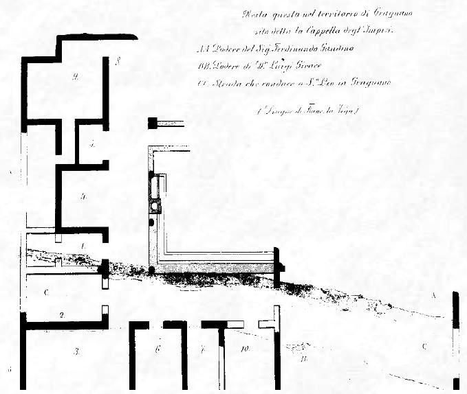 Pianta di Villa Cappella degli Impisi disegnata nel 1780